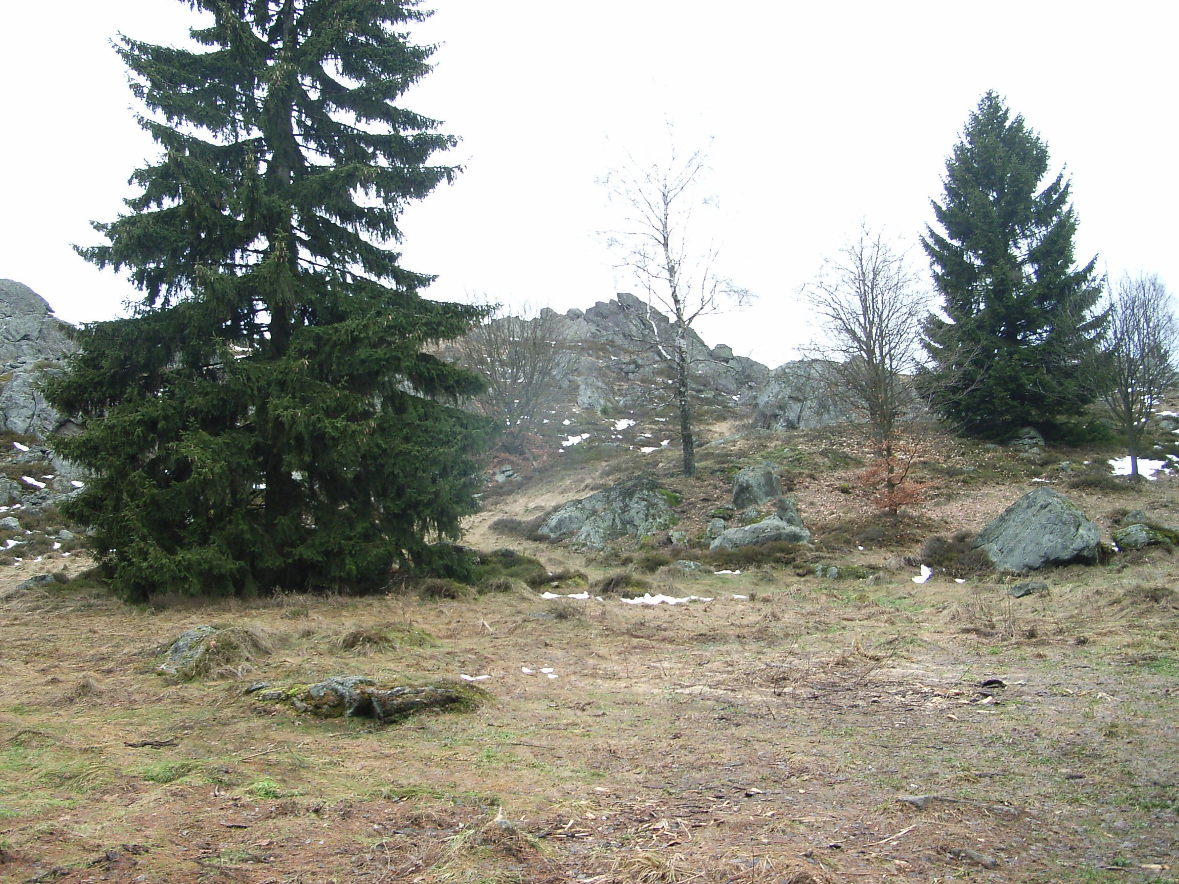 Stadlern Hochfels, Blockheide